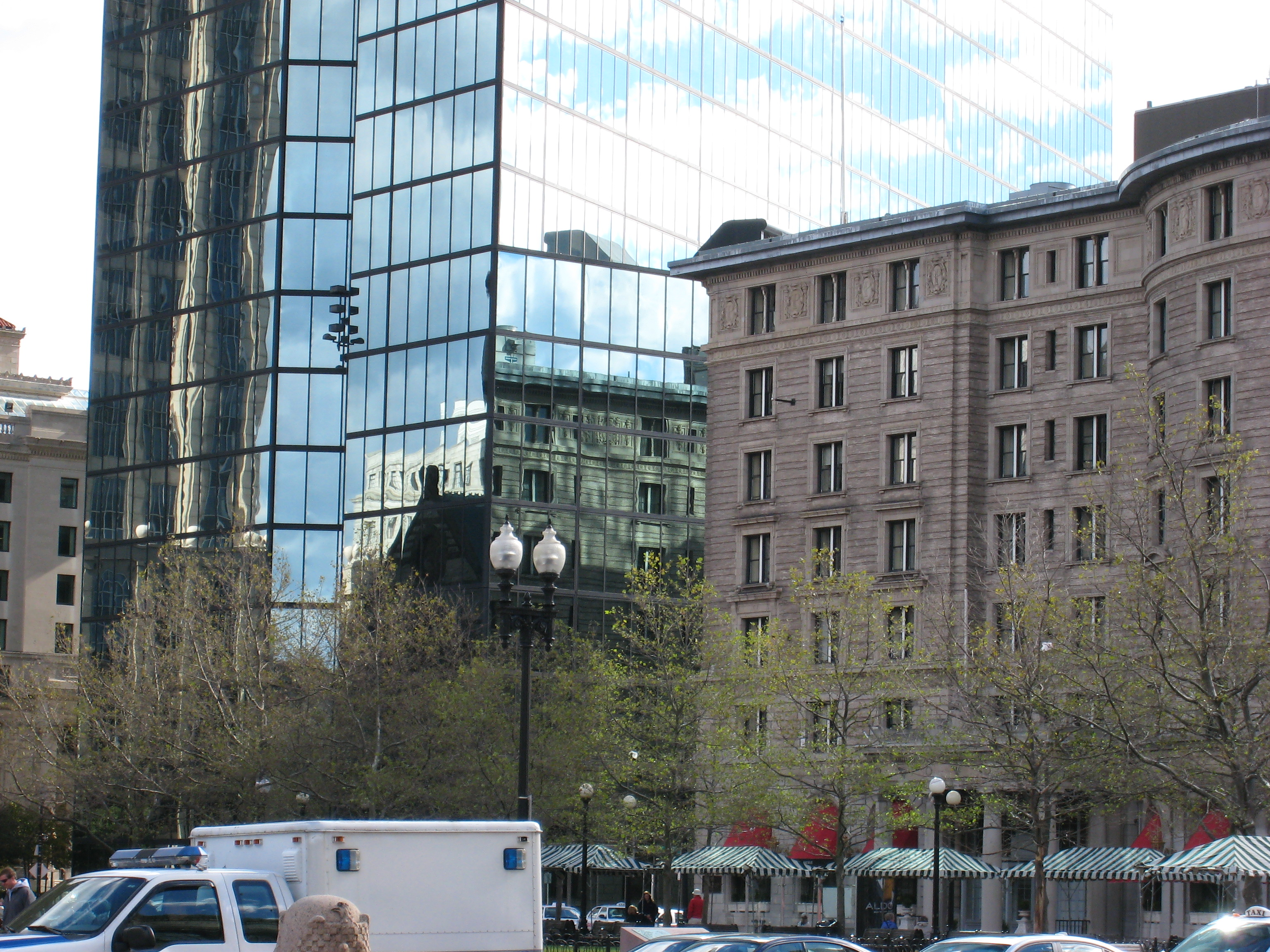 John Hancock Tower in Boston, spiegelt an klaren Tagen seine Umgebung wieder und fügt sich trotz seiner monolithischen Größe harmonisch in das Stadtbild ein